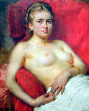 Jej Majestat Młodość, 1940